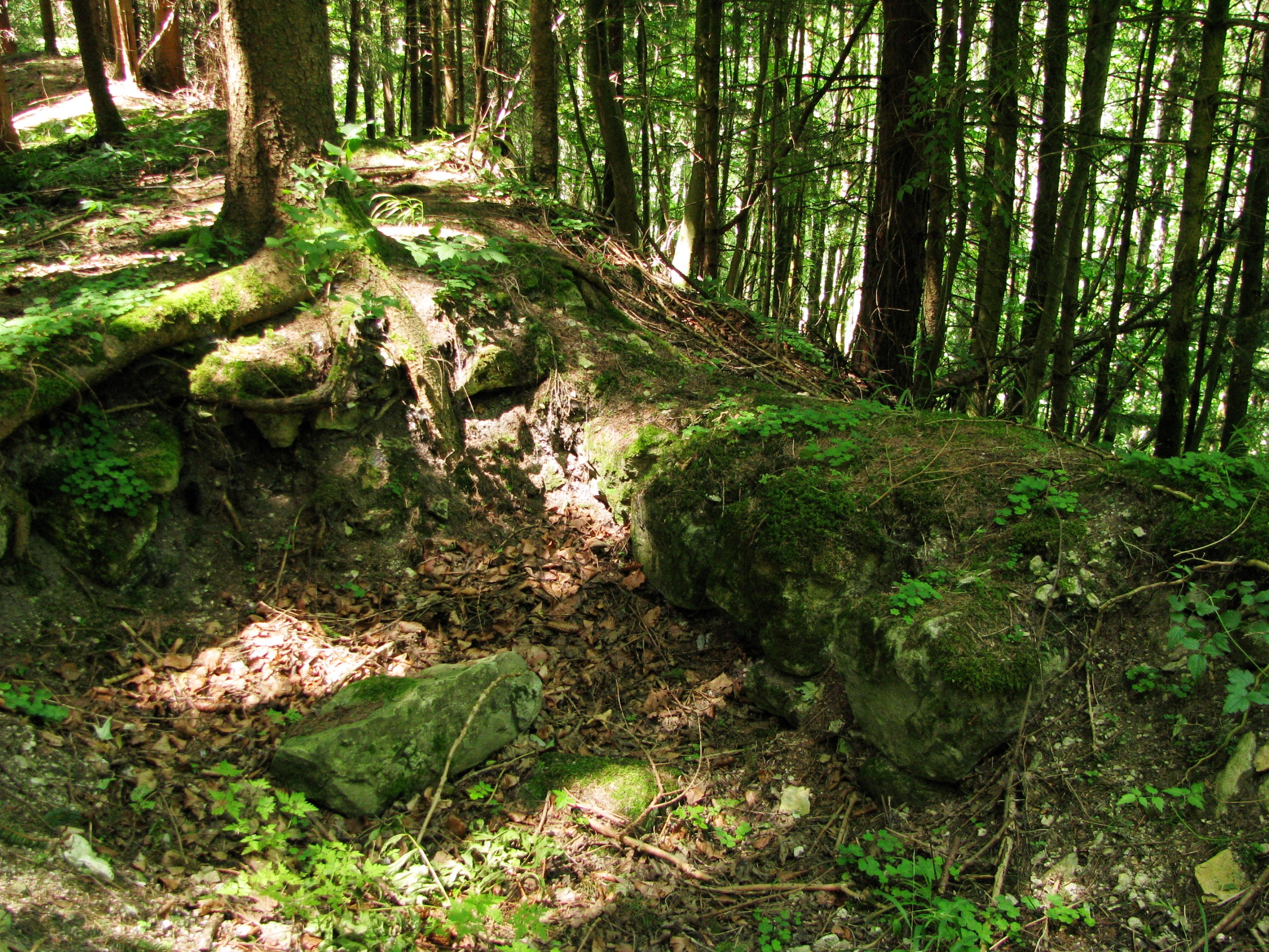 Burgstall Willenberg, Mauerreste